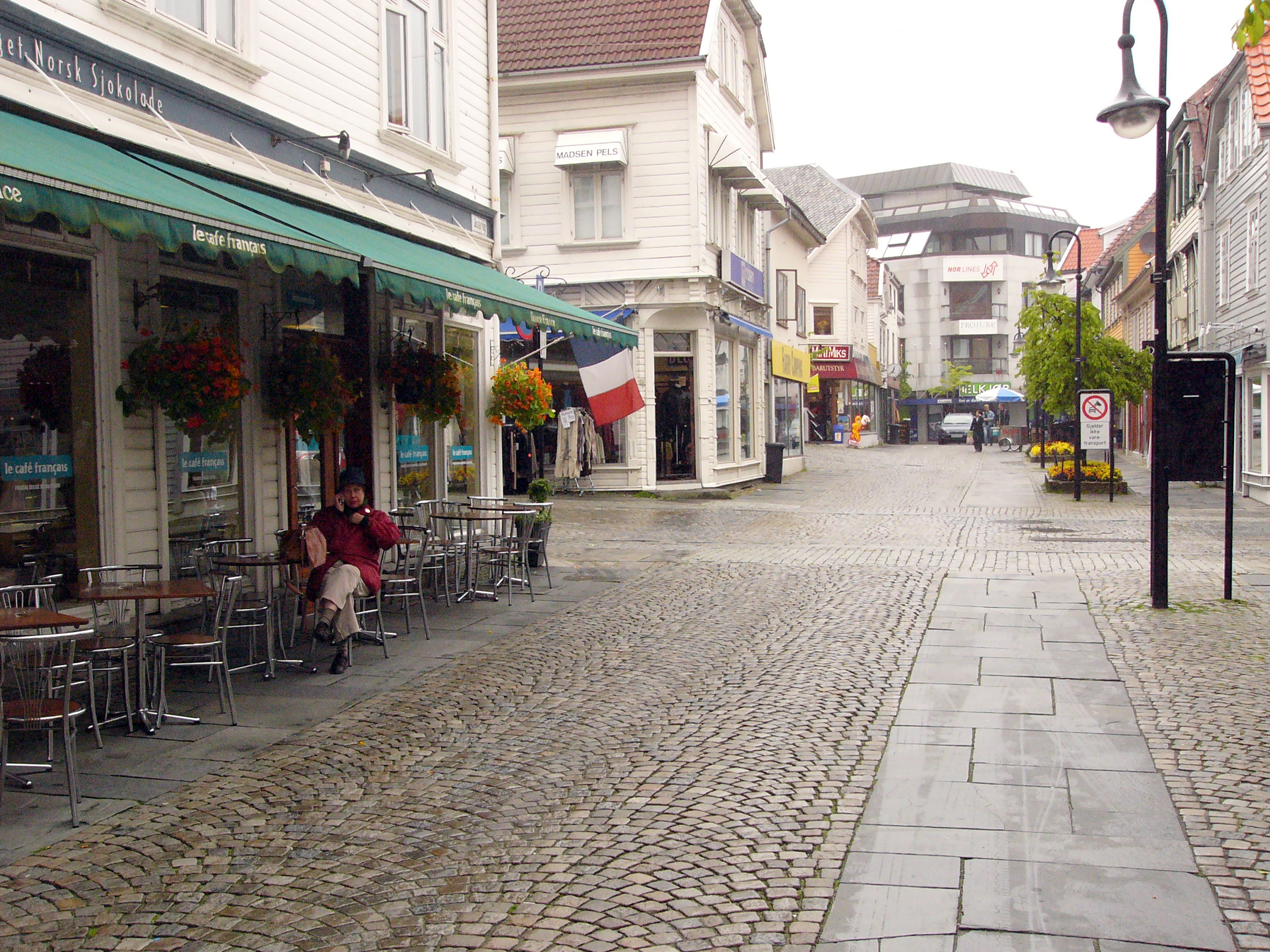 Street Østervåg in Stavanger, Norway